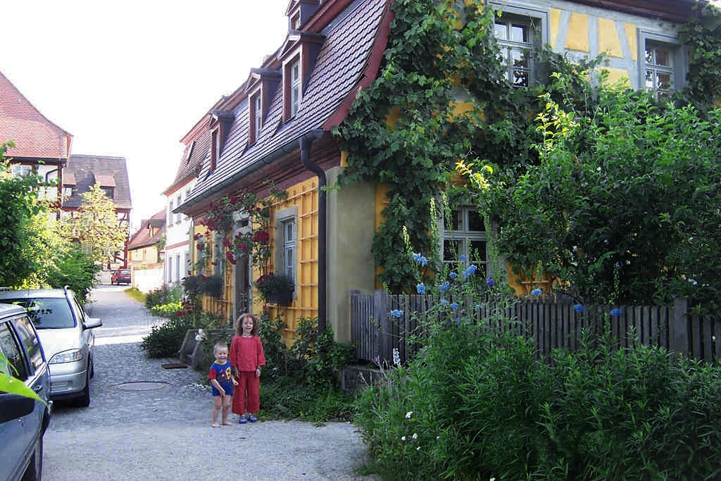 verträumte Ecke in Walsdorf fotografiert von L. Parisek